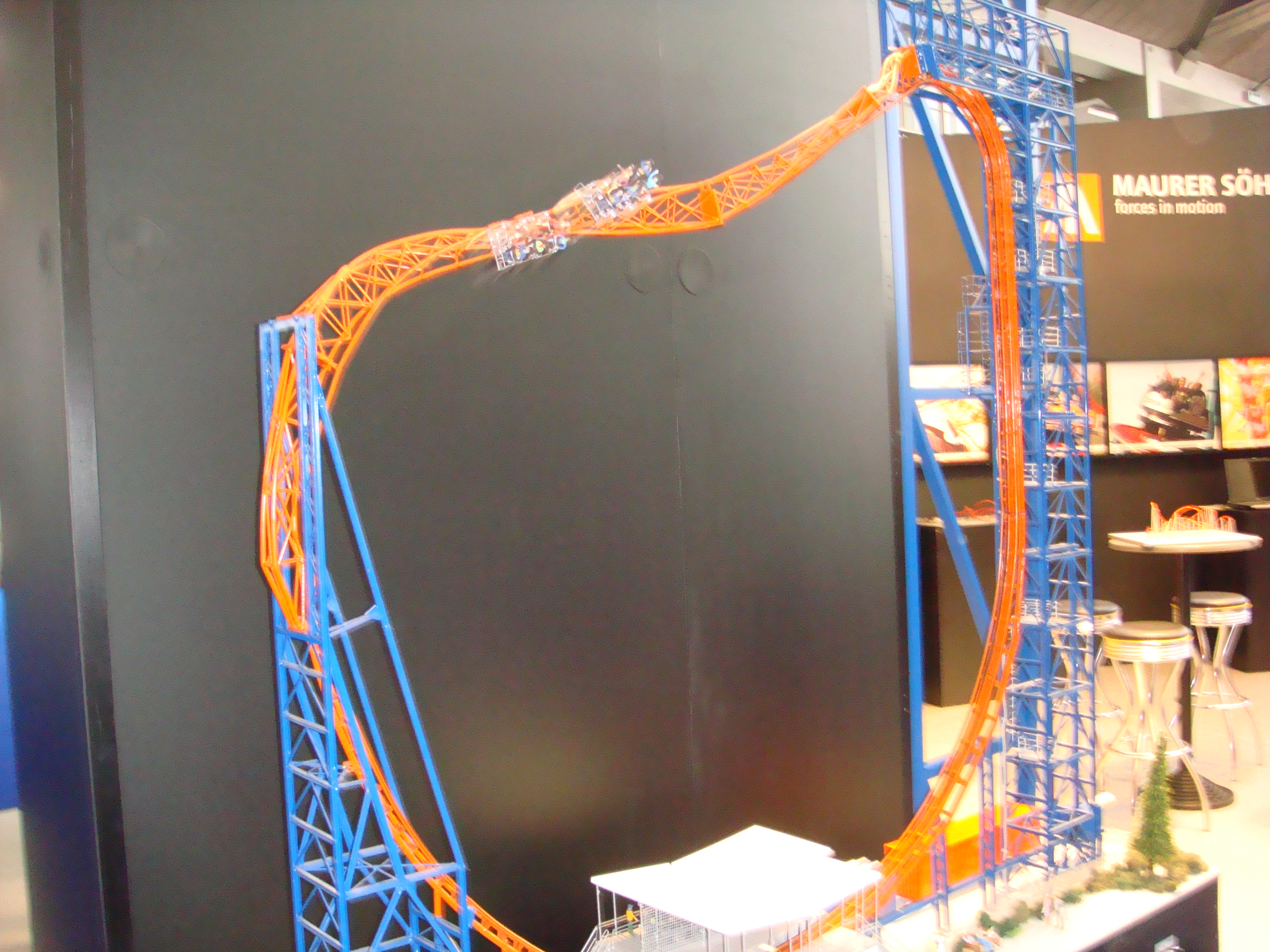 Maurer-Sohne X-Coaster Model